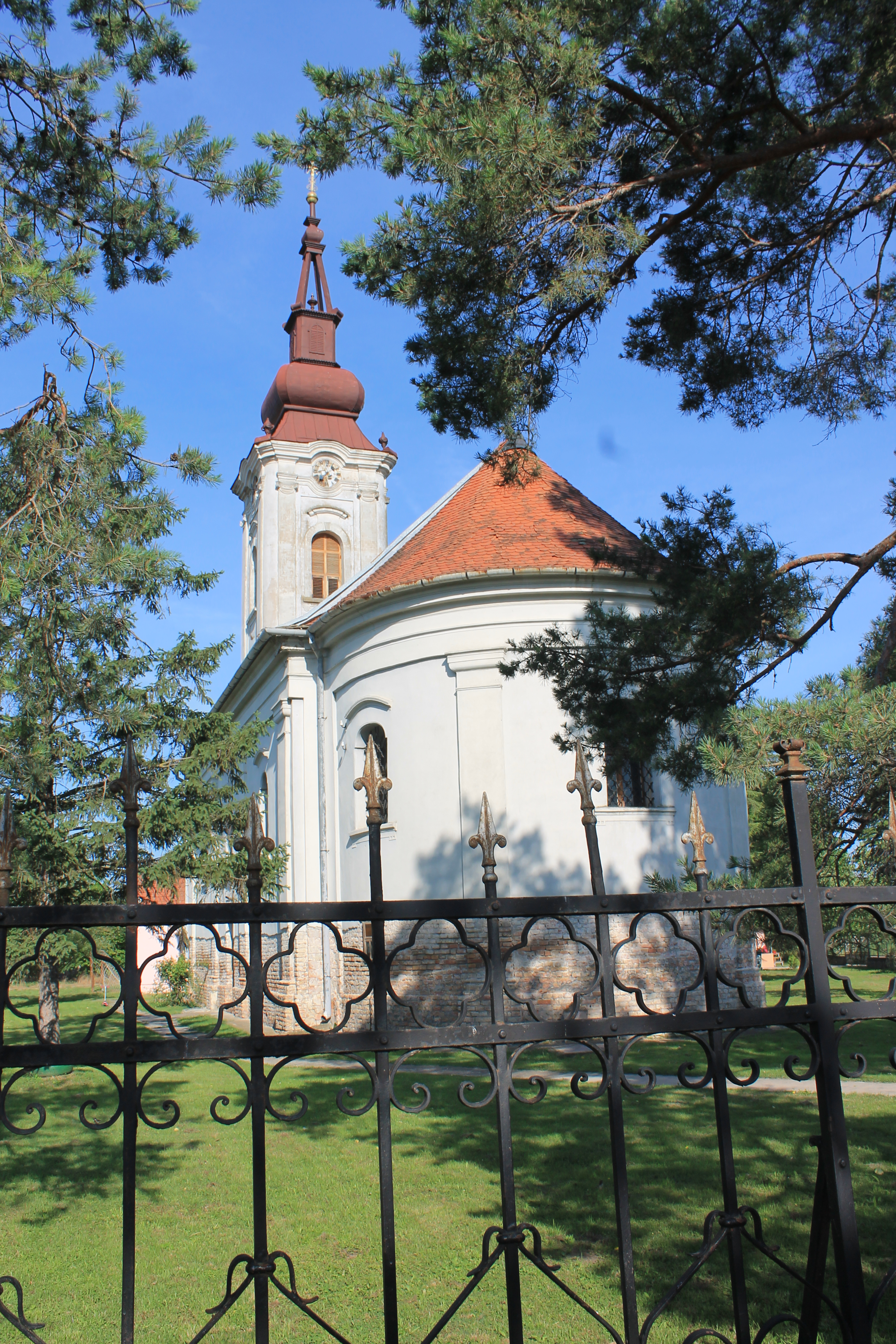 Buđanovci, crkva Sv. Mihaila i Gavrila